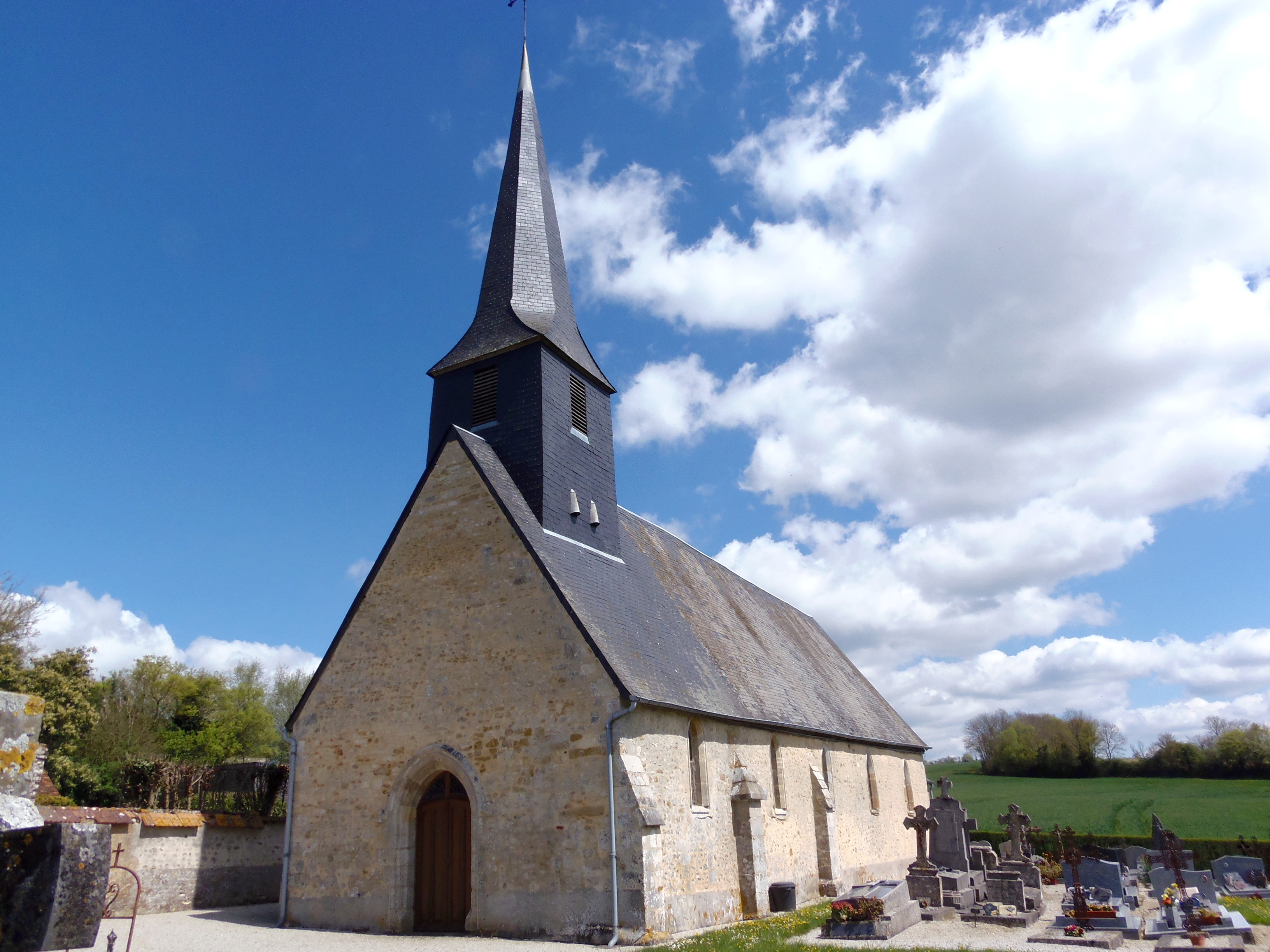 Trémont (Normandie, France). L'église Saint-Pierre.